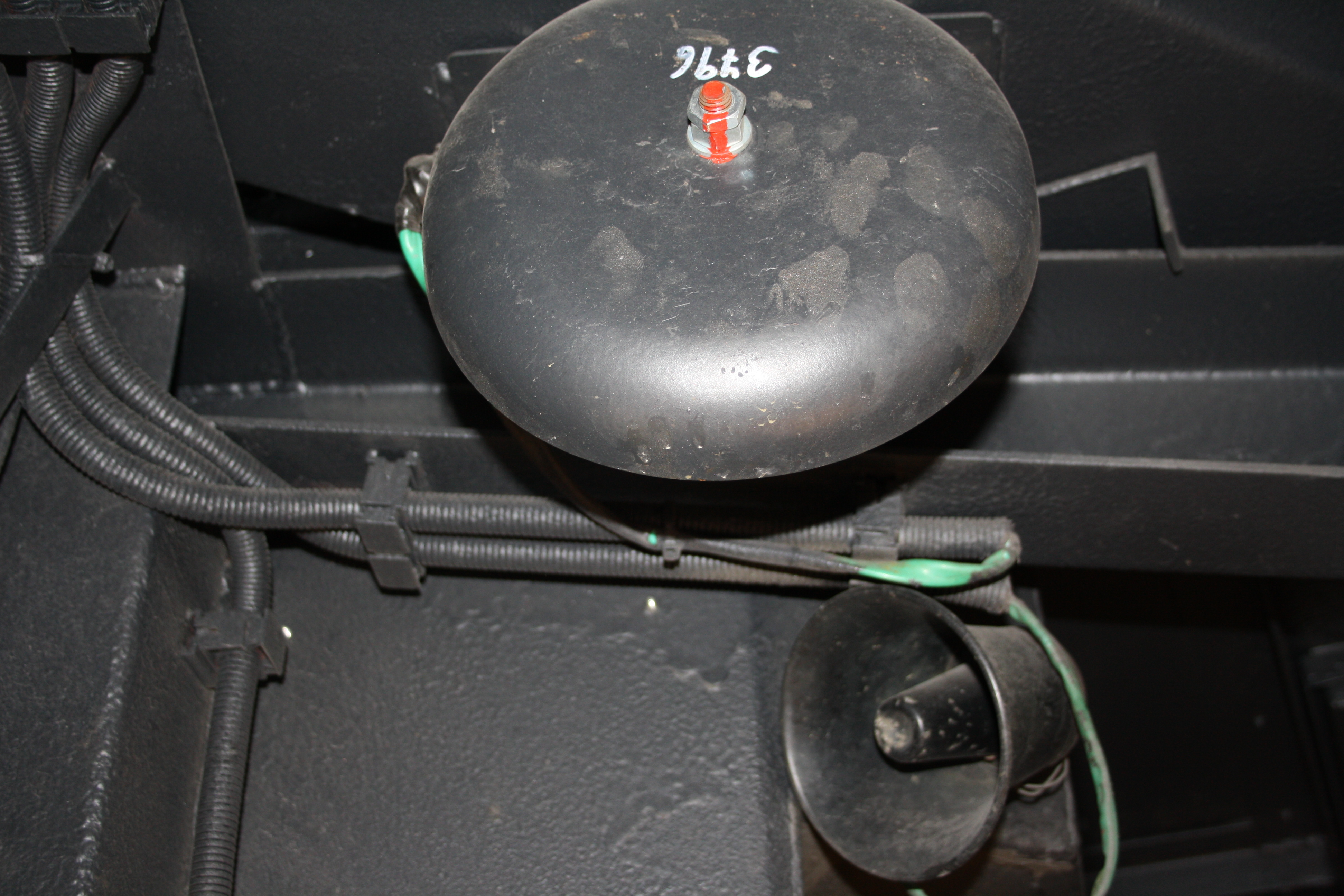 Pohled zespodu na tramvajový zvonec (v horní části snímku) na spodku skříně tramvaje T3. Reproduktor vpravo dole se zvoncem nesouvisí.